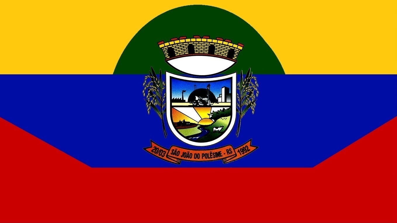 Bandeira do município gaúcho de São João do Polêsine